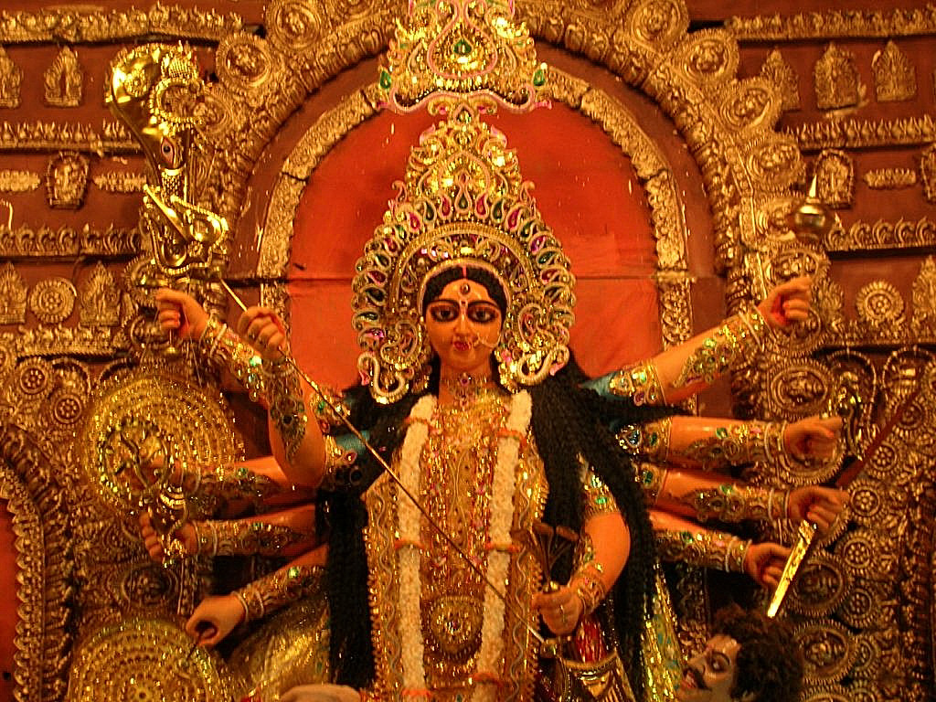 Durga Puja of Kolkata